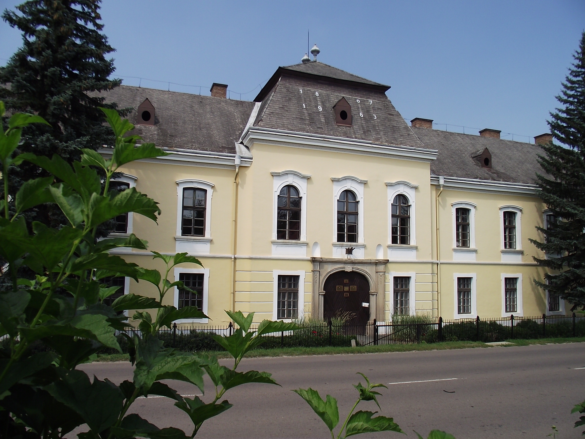 Keglevich kastély This is a photo of a monument in Hungary. Identifier: 5821